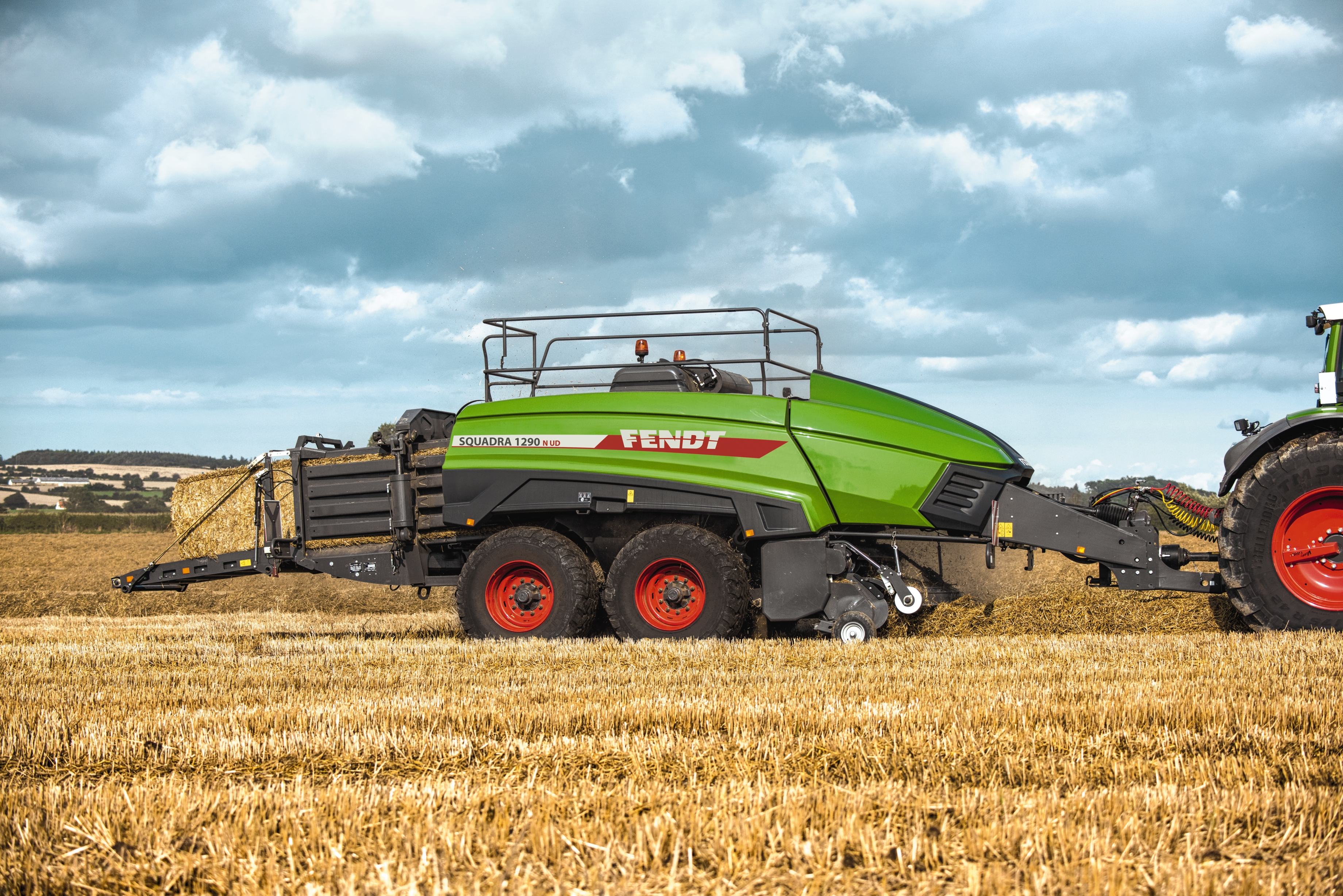 Fendt Squadra 1290 UD